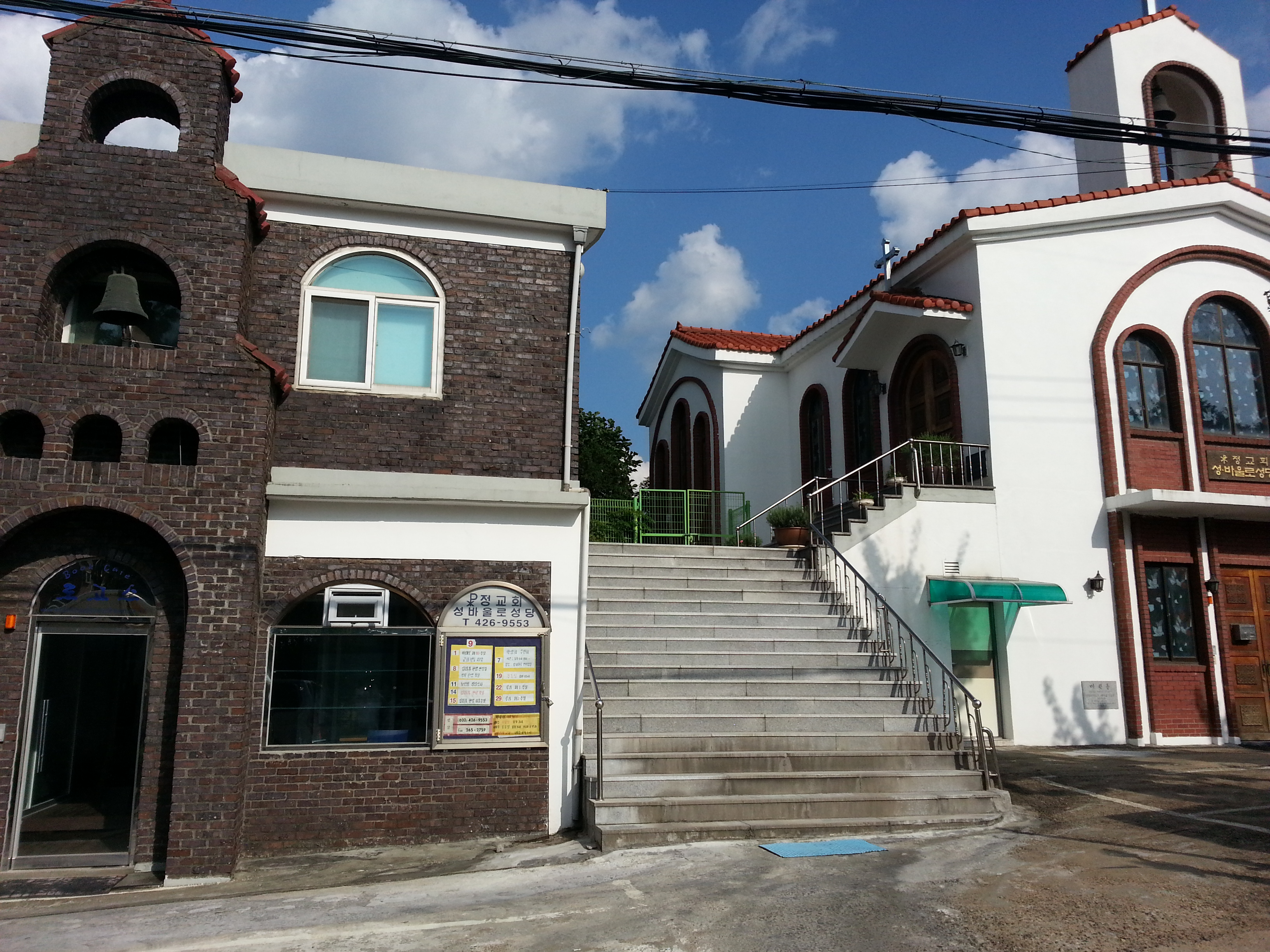 仁川聖パウロ聖堂(右)と付属書店『ロゴス』(左)